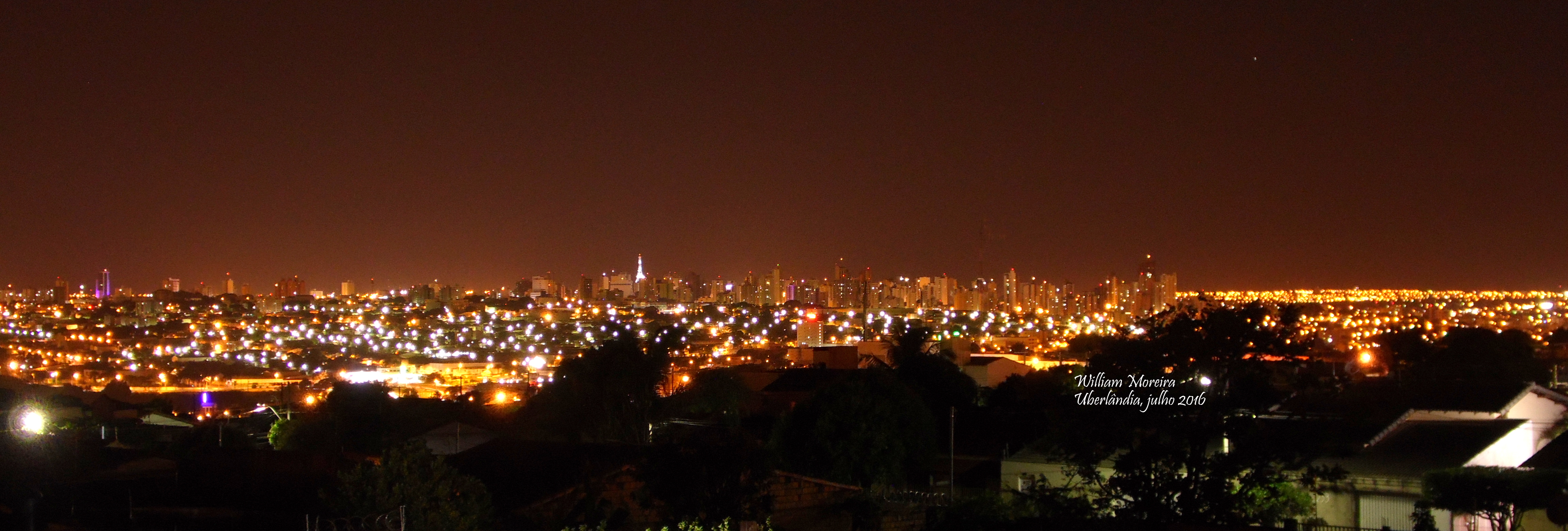 Vista de Uberlândia.